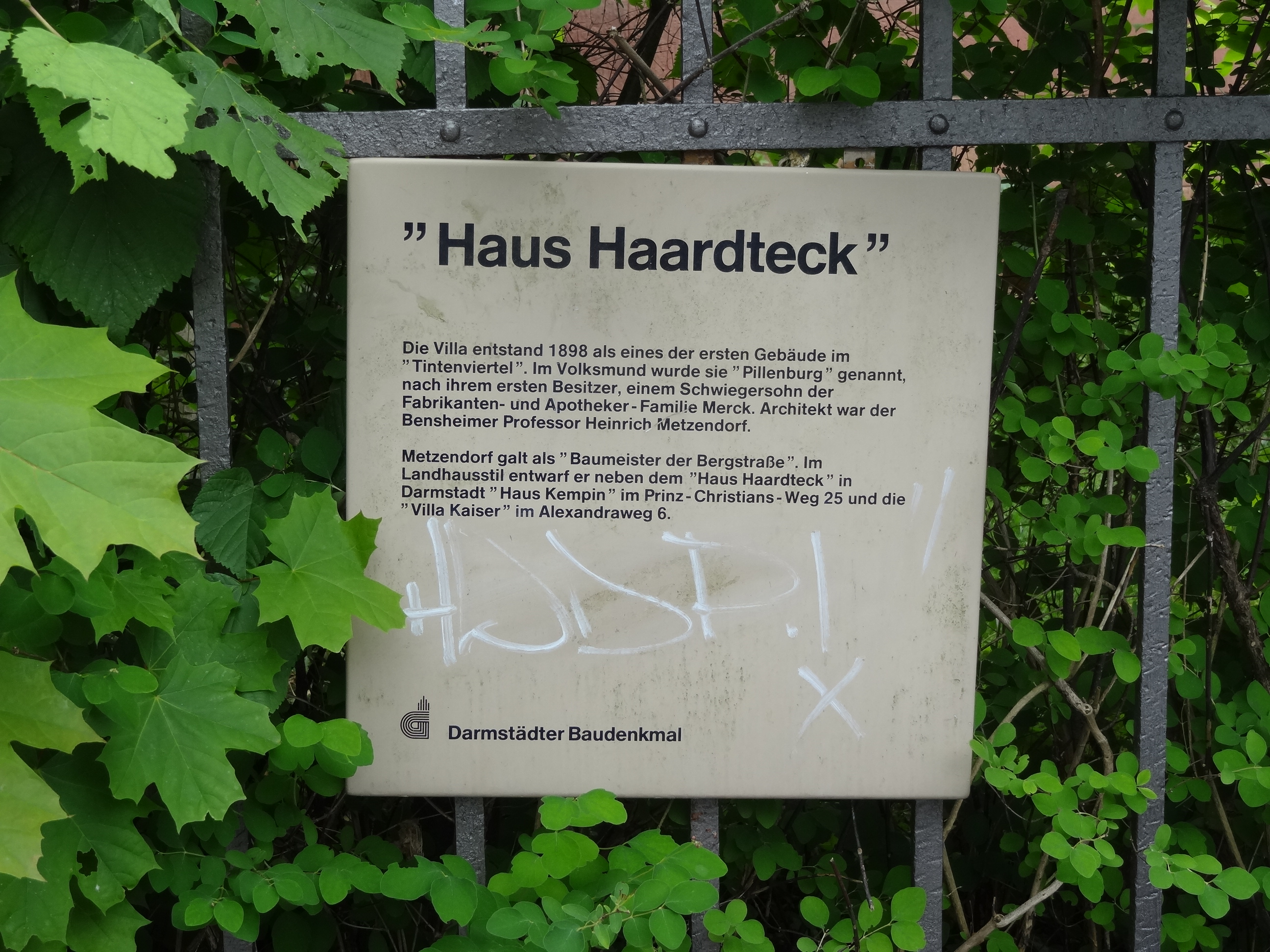 Haus Haardteck, Herdweg 79 in Darmstadt